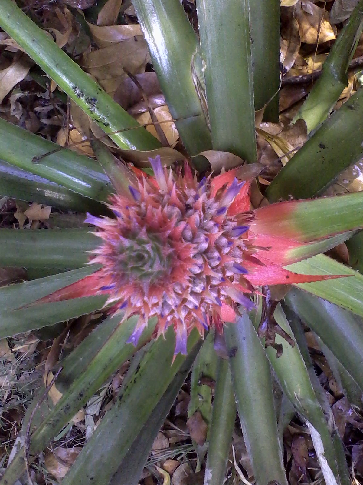 কচি আনারস